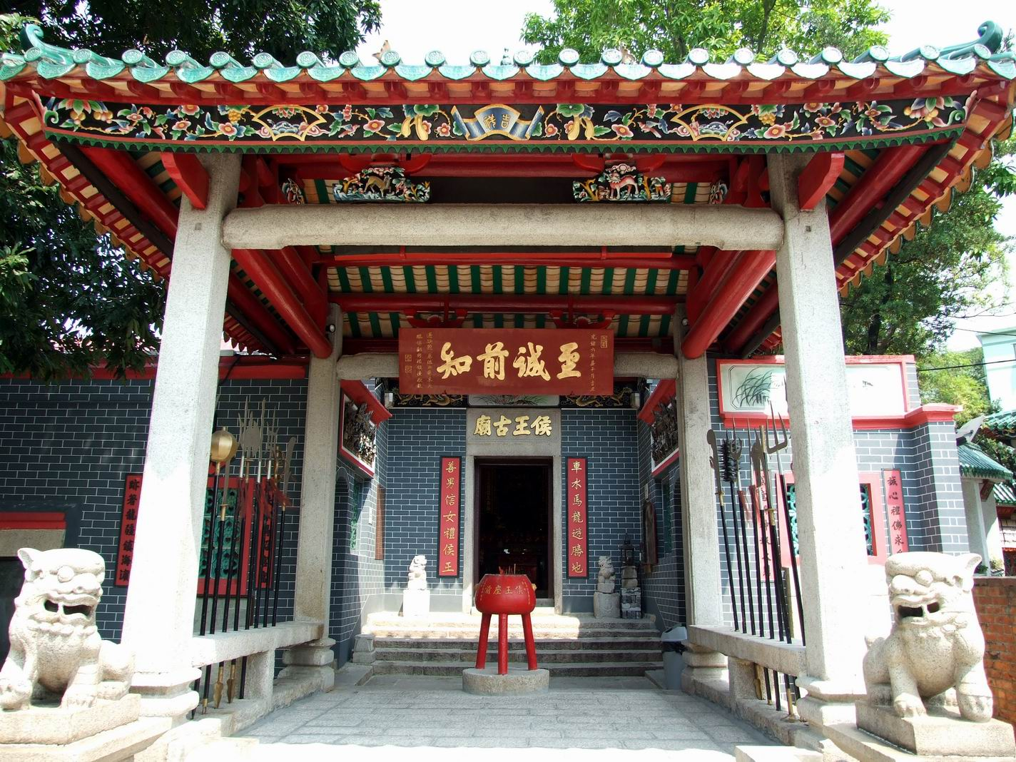 中文（香港）: 九龍城侯王廟